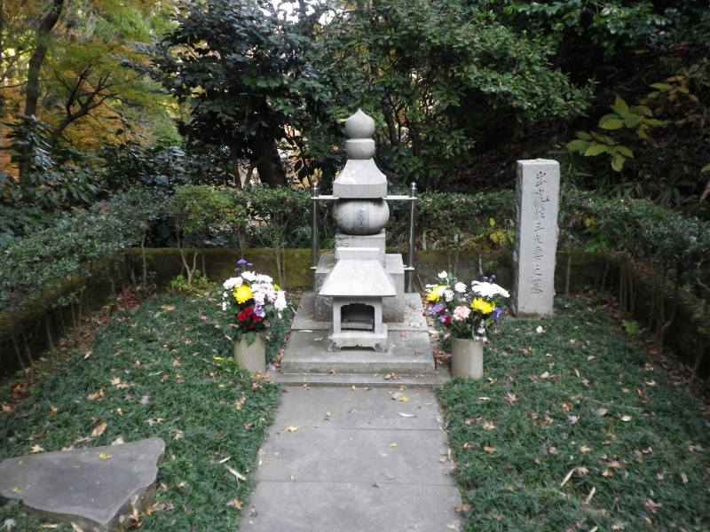 出光佐三の墓